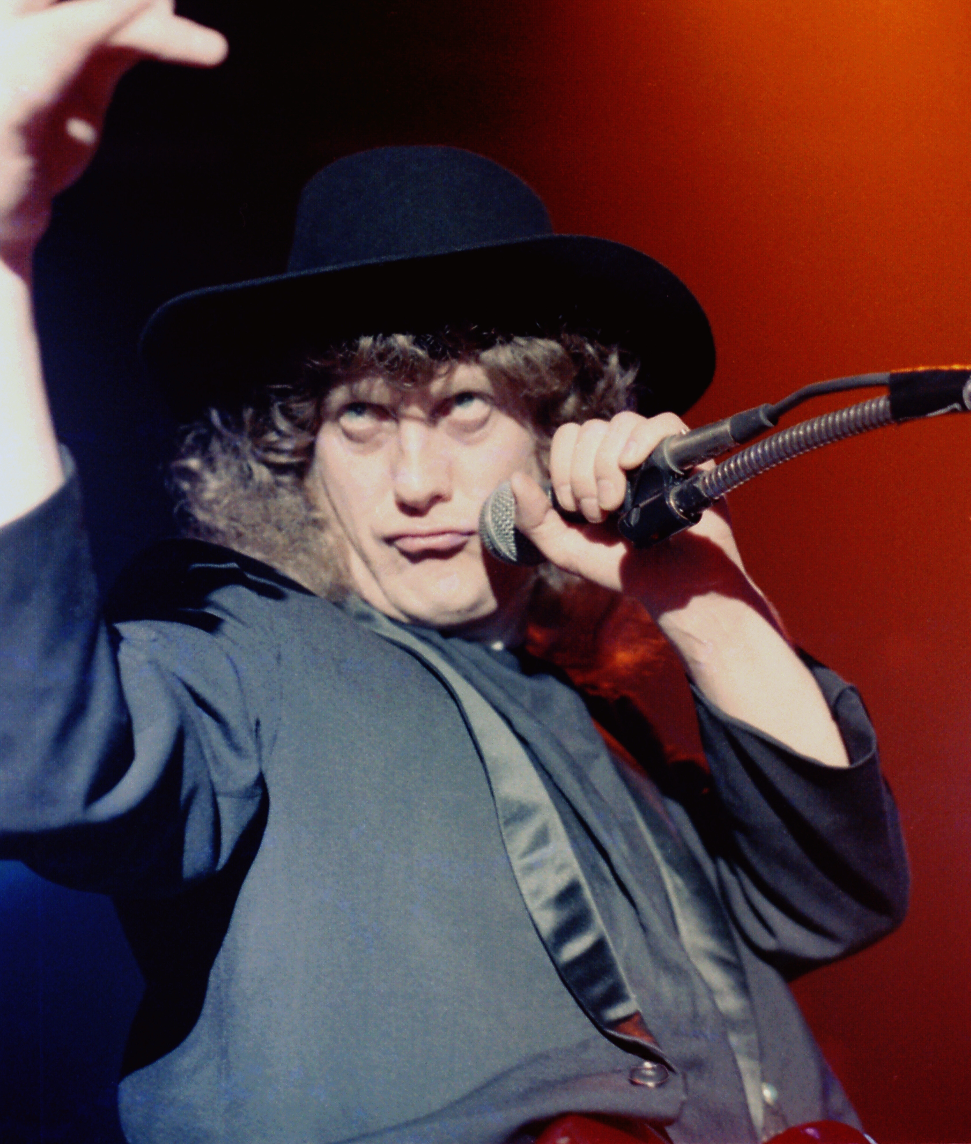 Noddy Holder, guitarist